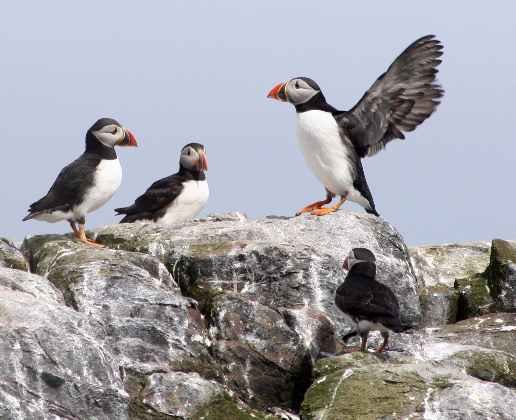 Eine Gruppe Papageitaucher, einer mit ausgebreiteten Fluegeln (aufgenommen bei den Farne Inseln, England) - A group of puffins, one with spread wings (photo taken n. Farne Islands, England)